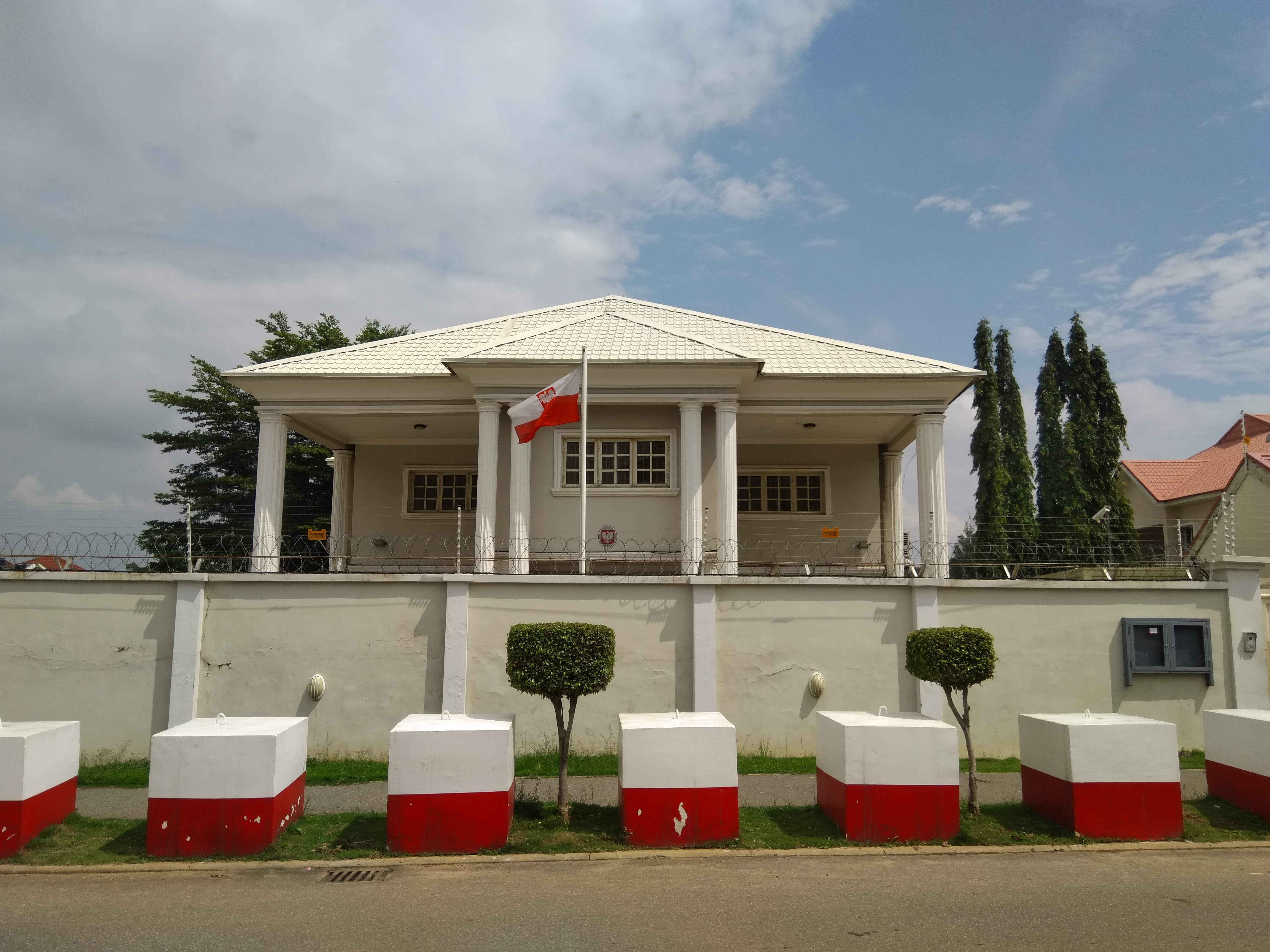 Ambasada Polski w Abudży